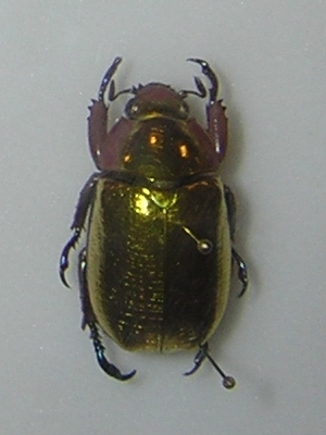 Chrysina aurigans (syn. Plusiotis aurigans)